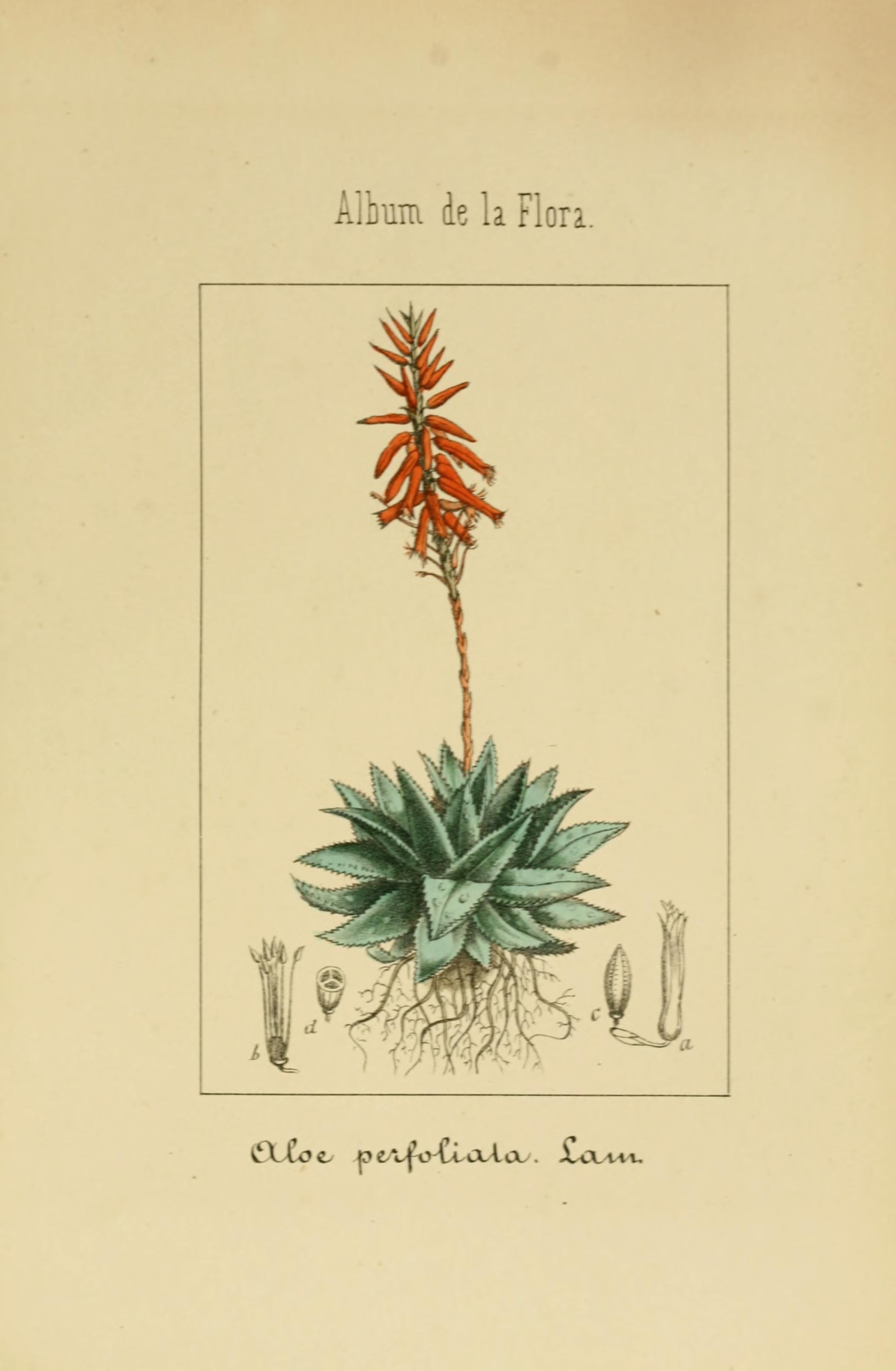 Albnm de la Flon. ^.XXcc. pe/c^vCLcLÍCL. íii^^xA/u